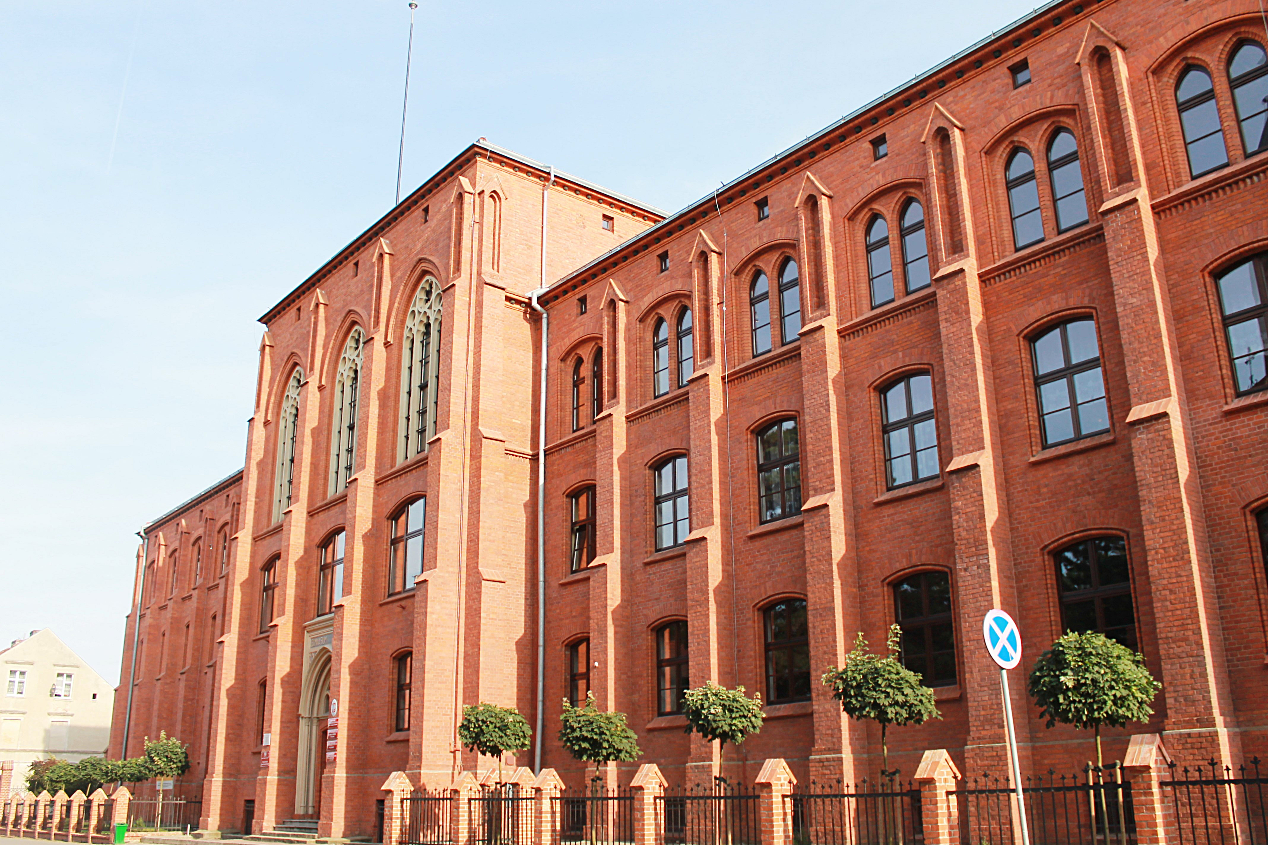 Chełmno, zespół królewskiego katolickiego gimnazjum, ob. zespół szkół